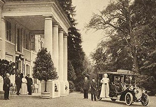 Der rumänische König Karl I. (* 1839; † 1914) auf dem Schlossgut Umkirch.